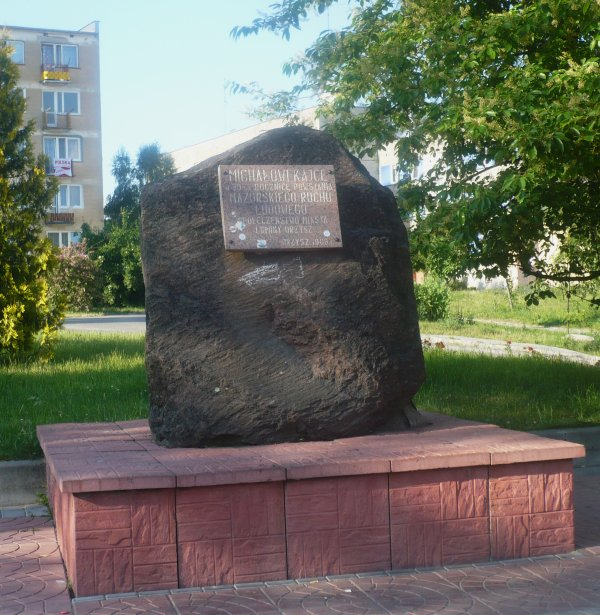 Orzysz. Kamień poświęcony Michałowi Kajce